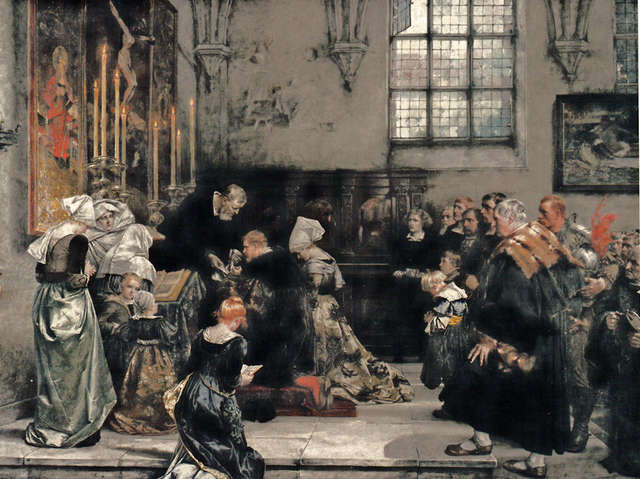 Ernst der Bekenner nimmt in der Schlosskapelle zu Celle zum ersten Male das Abendmahl in beiderlei Gestalt. Ölgemälde (214x293 cm) von Hugo Vogel (1855–1934) aus dem Jahr 1887 im Depot des Niedersächsischen Landesmuseums in Hannover.